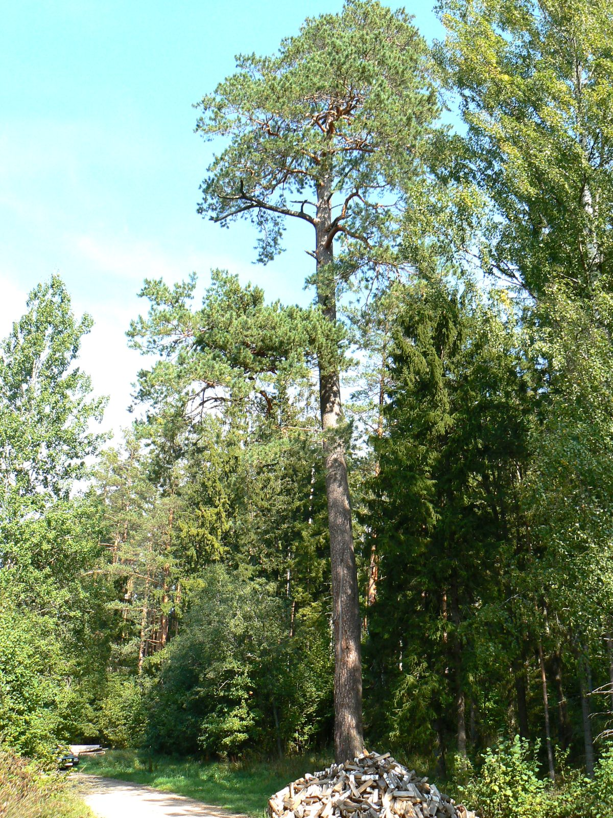 Kambja ristimänd